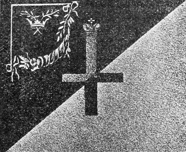 Знамя Ингерманландского гусарского полка 1712—1727 гг. Это изображение было использовано для иллюстрирования статьи «Ингерманландский, 10-й гусарский, Его Королевского Высочества Великого Герцога Саксен-Веймарнского, полк» опубликованной в десятом томе «Военной энциклопедии», который был издан книгоиздательским товариществом И. Д. Сытина в 1912—1913 гг. в столице Российской империи городе Санкт-Петербурге.